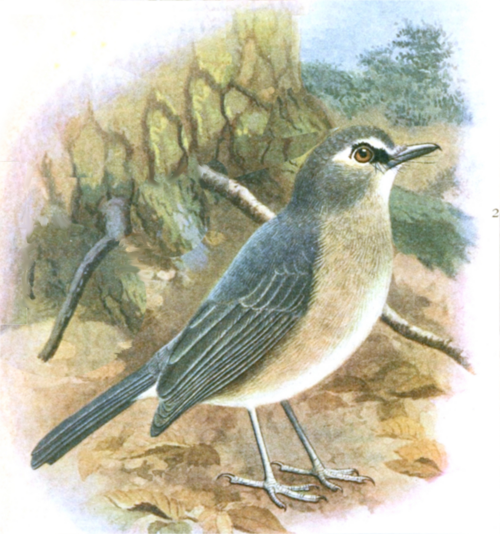 Rhinomyias goodfellowi